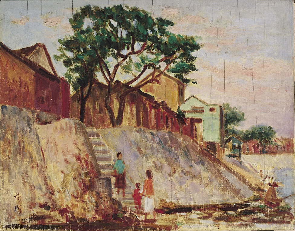 李梅樹作品：午後河岸，1959，油彩畫布。午後的河岸，暑氣稍退，潮濕的空氣已透一絲黃昏的涼意，話家常的婦女與河畔的搗衣聲，交織成一幅真實而甜美的畫面。